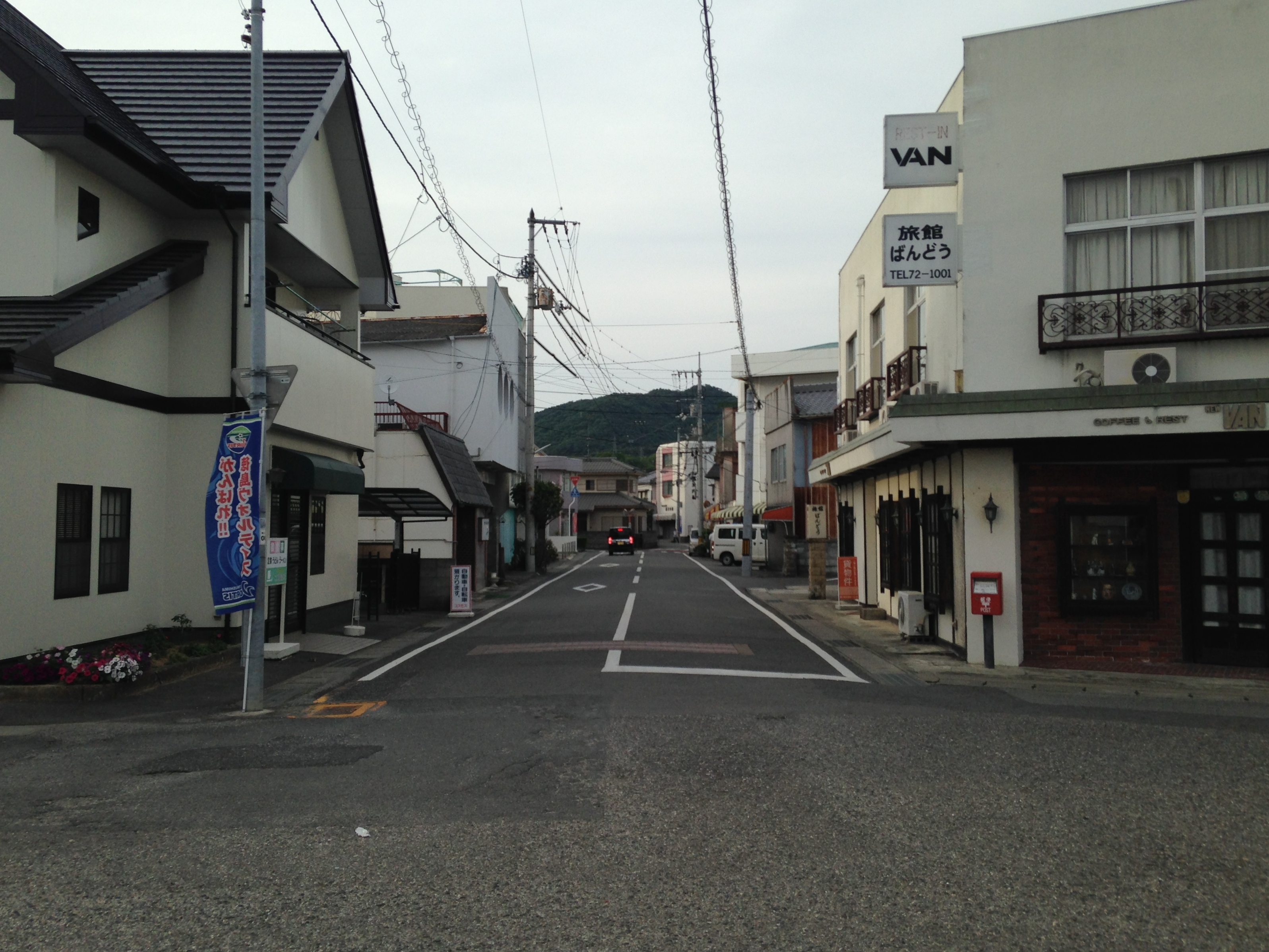 板野駅の駅前風景